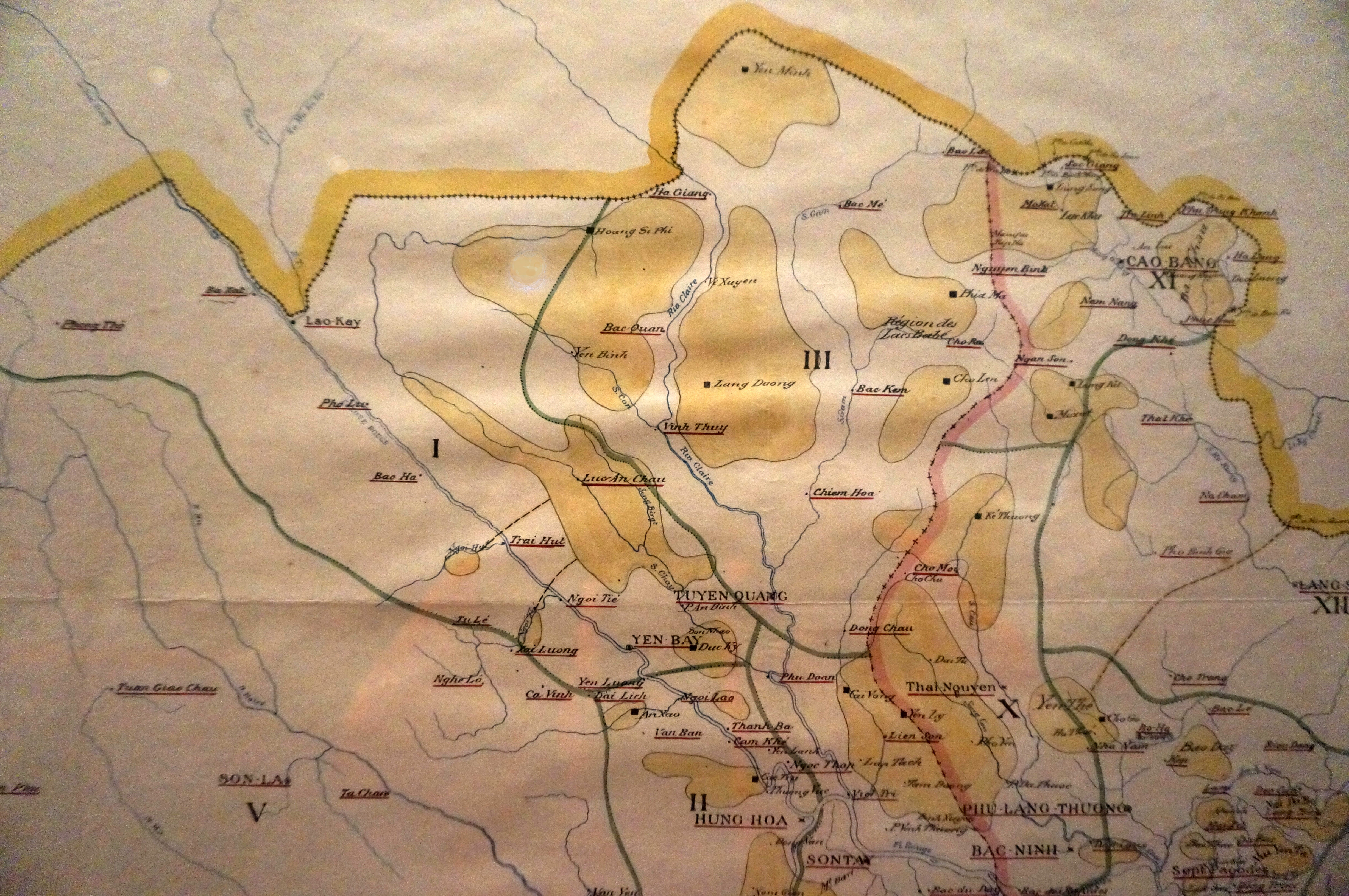 Présenté lors de l'exposition Indochine des territoires et des hommes 1856 1956.